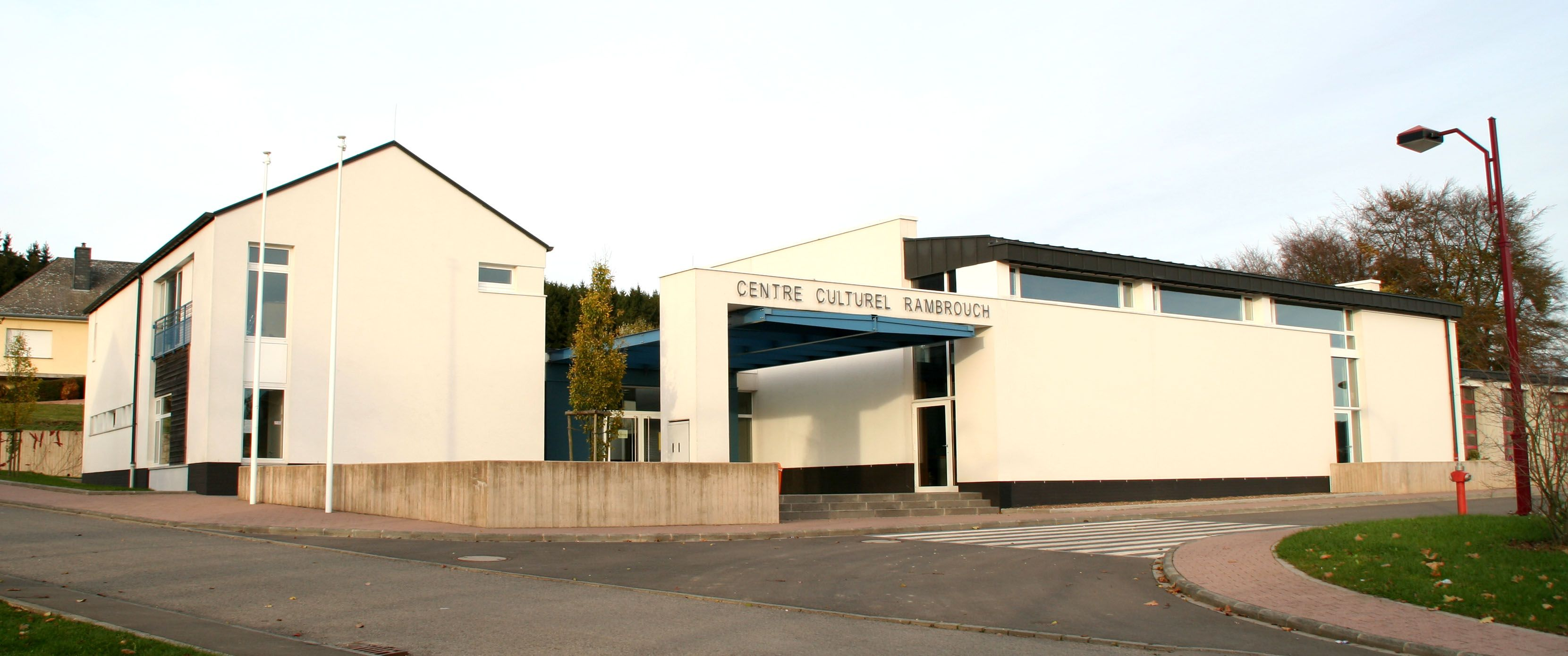 Centre Culturel zu Rammerech